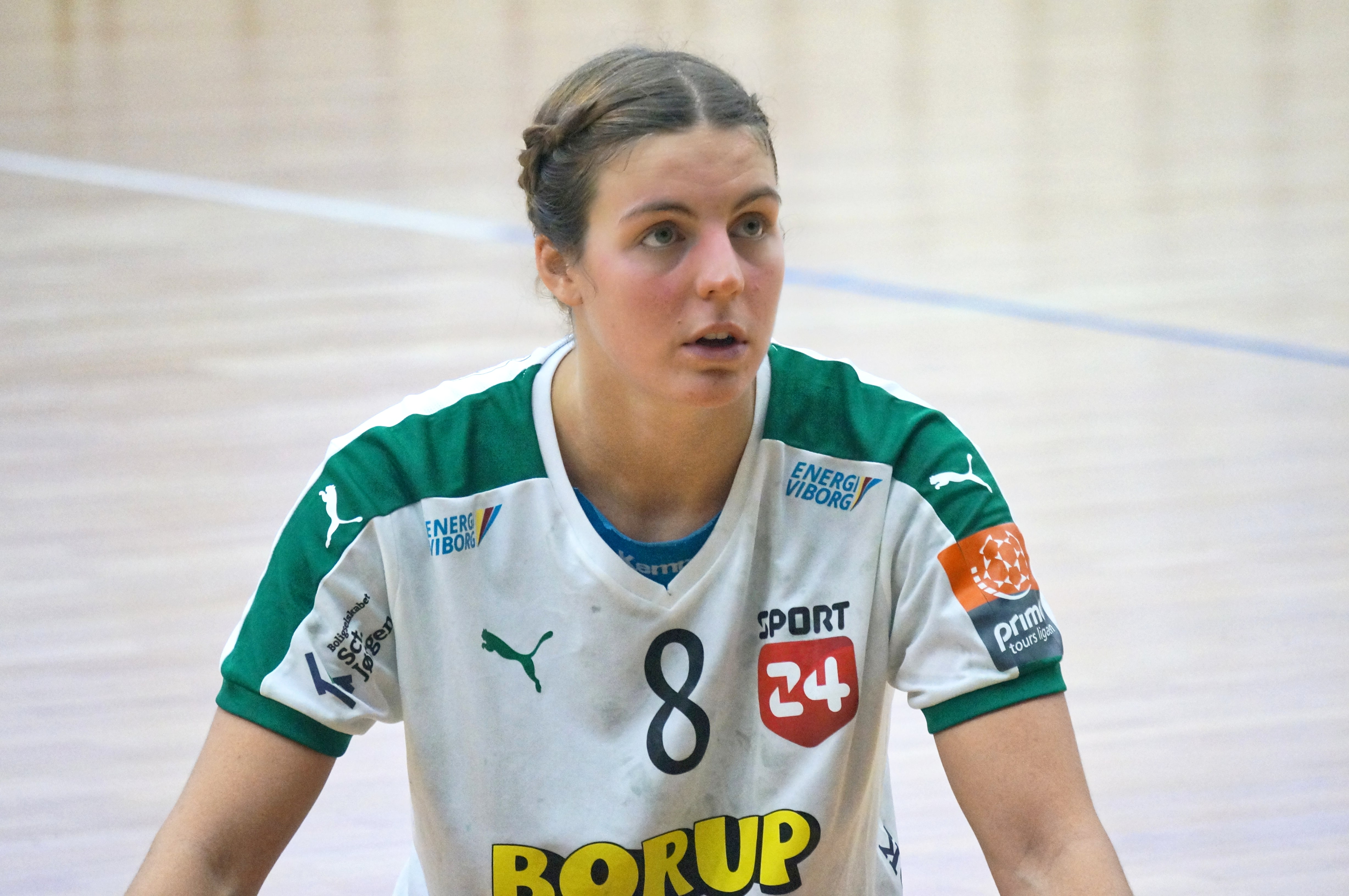 Матч Кубка ЕГФ "Лада" (Тольятти) - "Виборг" (Виборг). Тольятти, Россия, 13 ноября 2016. Карин Стрёмберг (ГК "Виборг" №8)